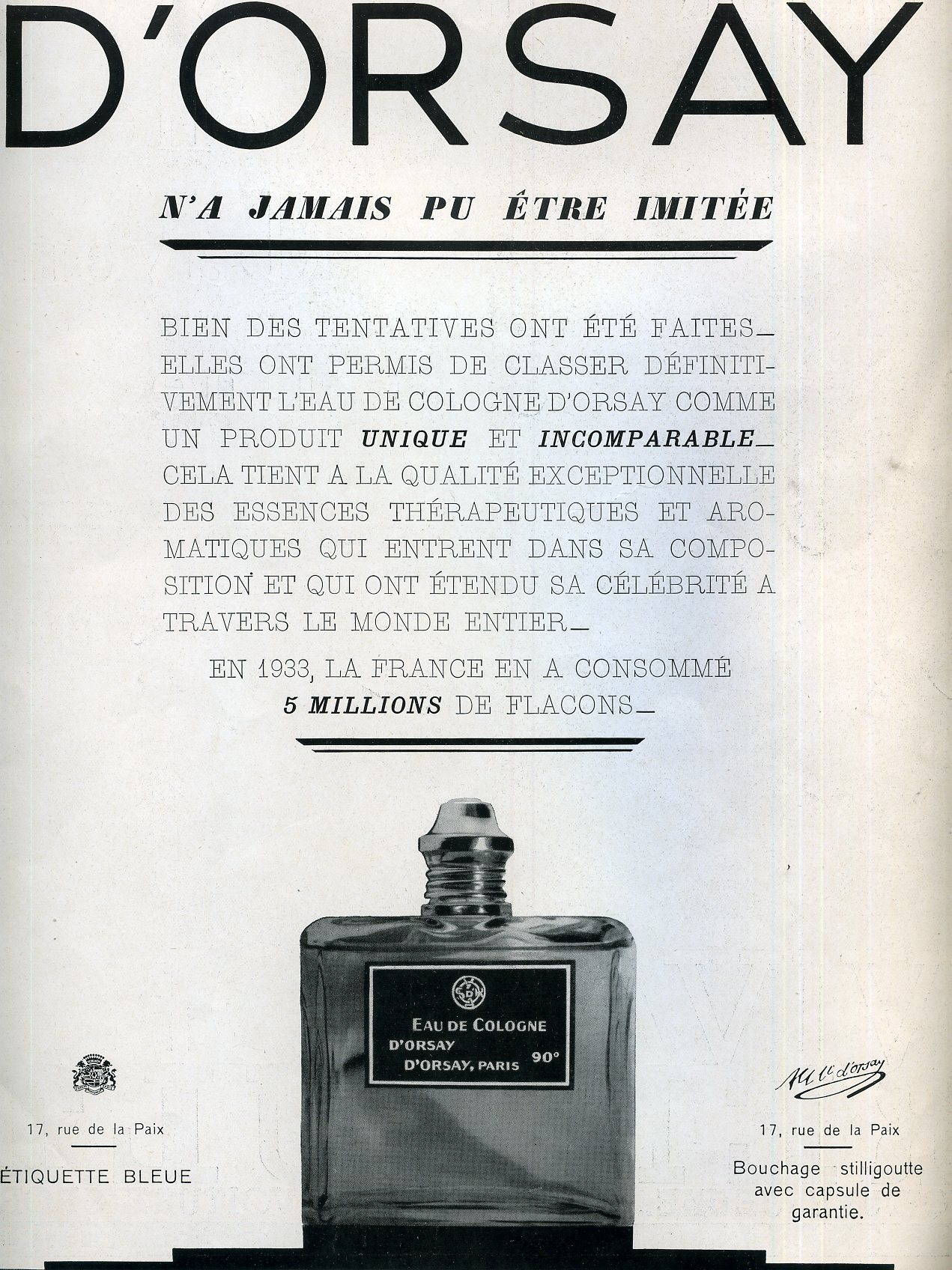 Eau de Cologne